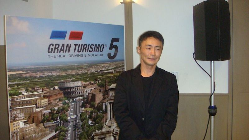 《跑車浪漫旅5》製作人山內一典出席2010東京電玩展。